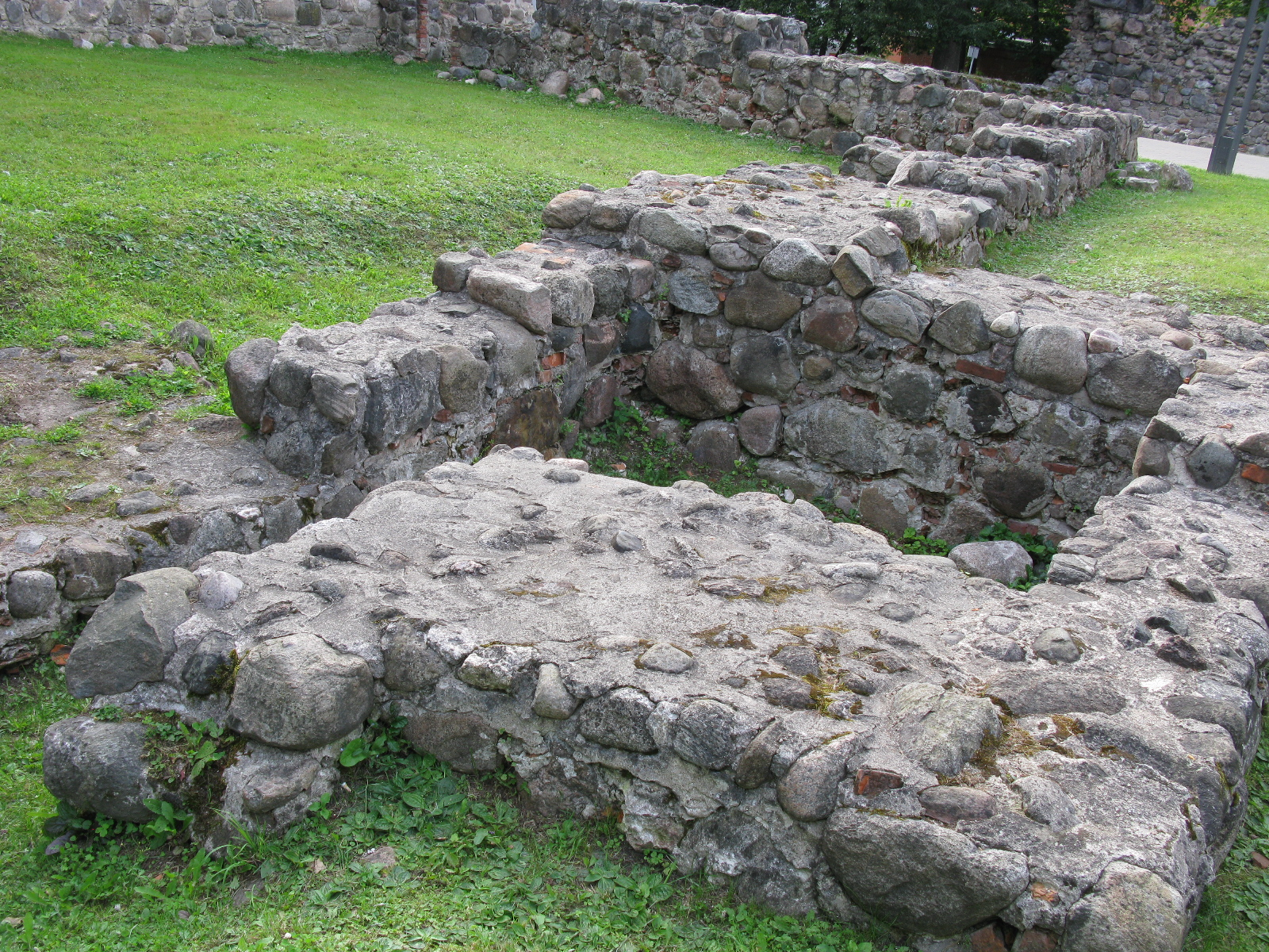 Ümber - või juurdeehitus I eeslinnuse lõunapoolse edelatiiva välisküljel. Sellest ettepoole jääb ka I eeslinnuse kaev.